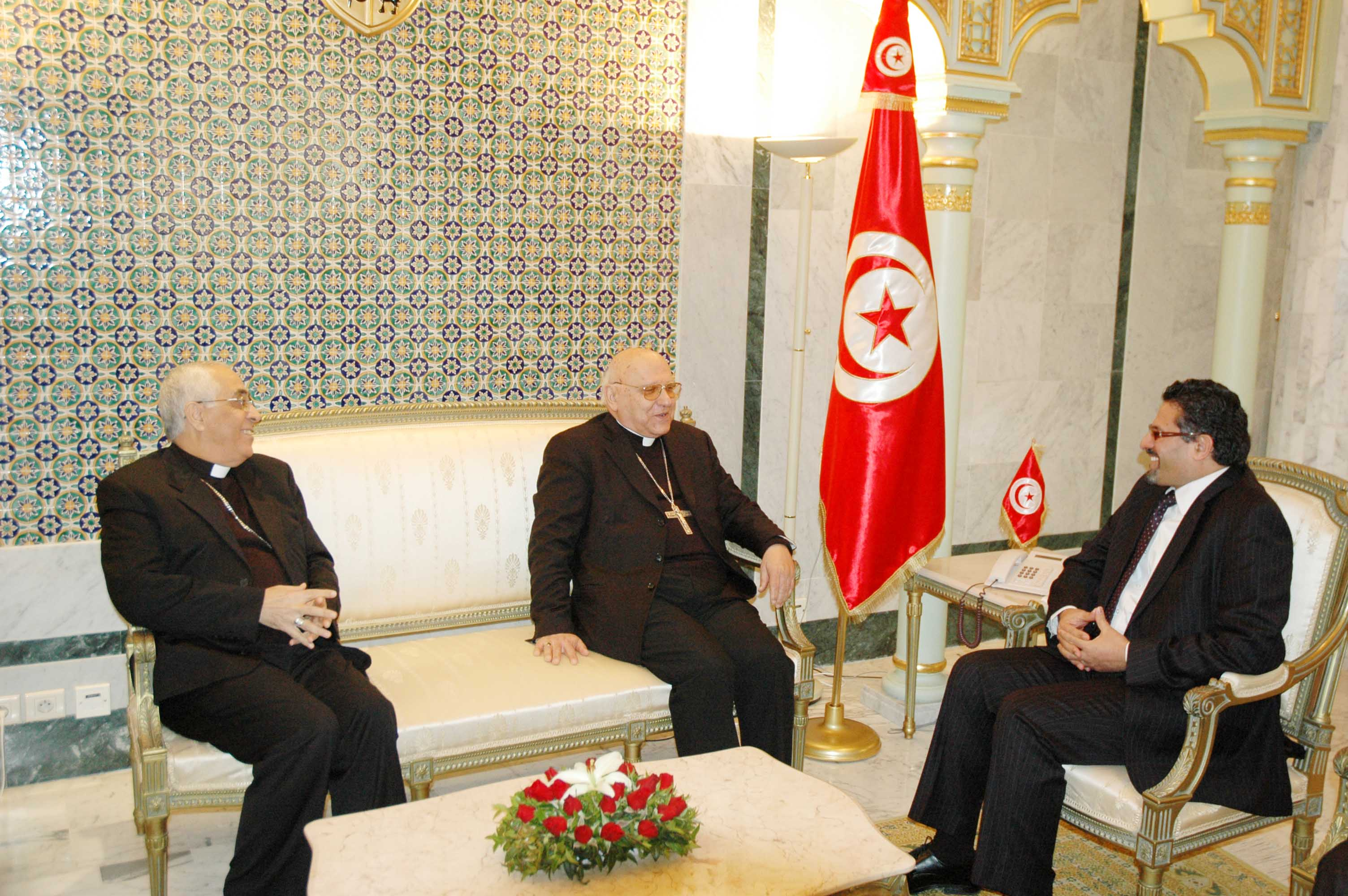 Dr Rafik Abdessalem a reçu Mgr Michel Sabbah, Patriarche de Jérusalem